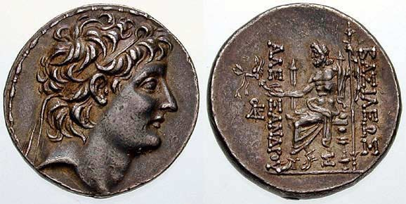 uzurpator władzy królewskiej w państwie Seleucydów(128-123p.n.e.)